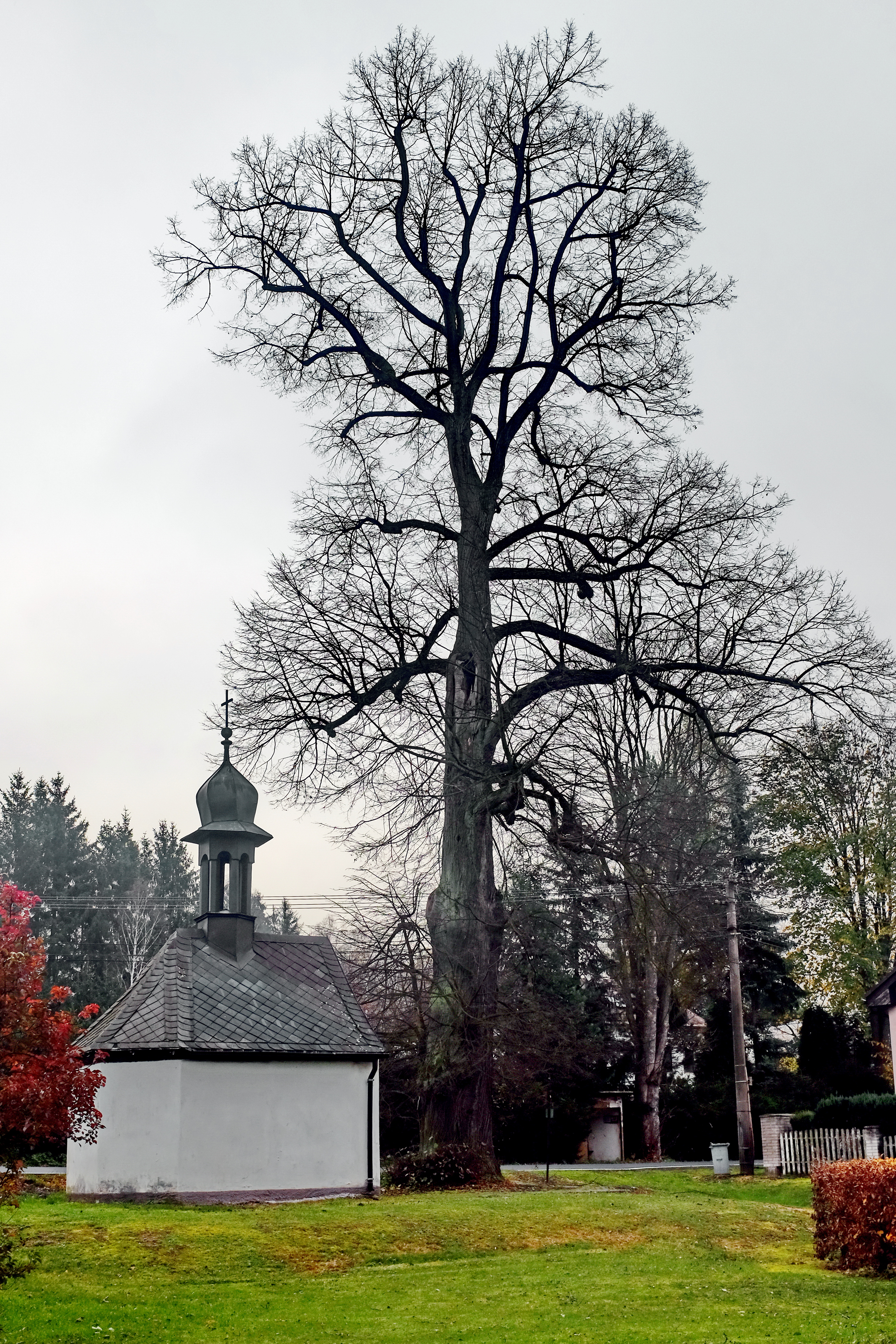 Památný strom - Lípa u kapličky - v Nivách, místní části Děpoltovic, okres Karlovy Vary